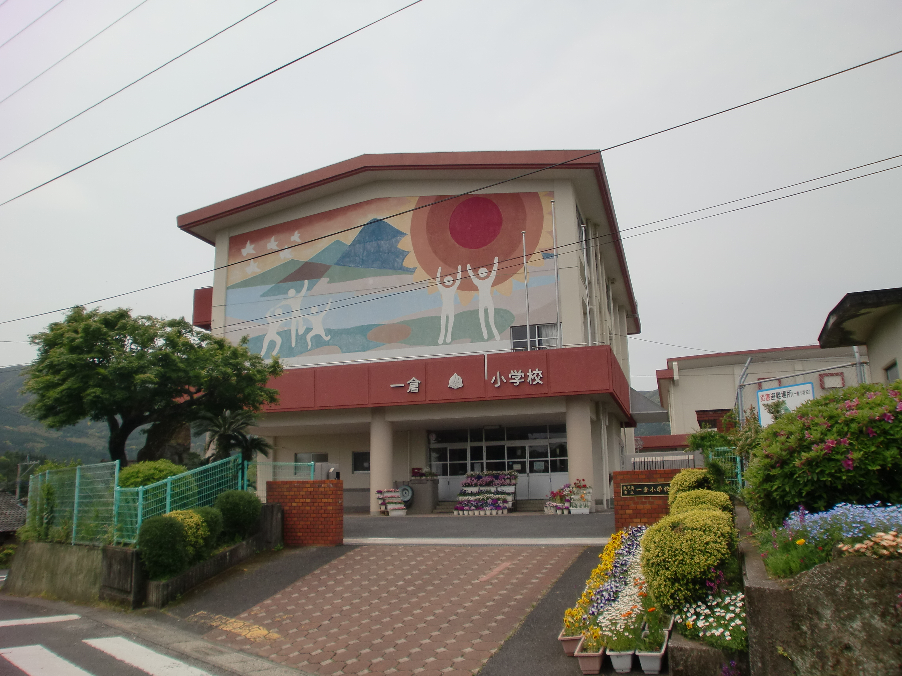 鹿児島市立一倉小学校の外観。